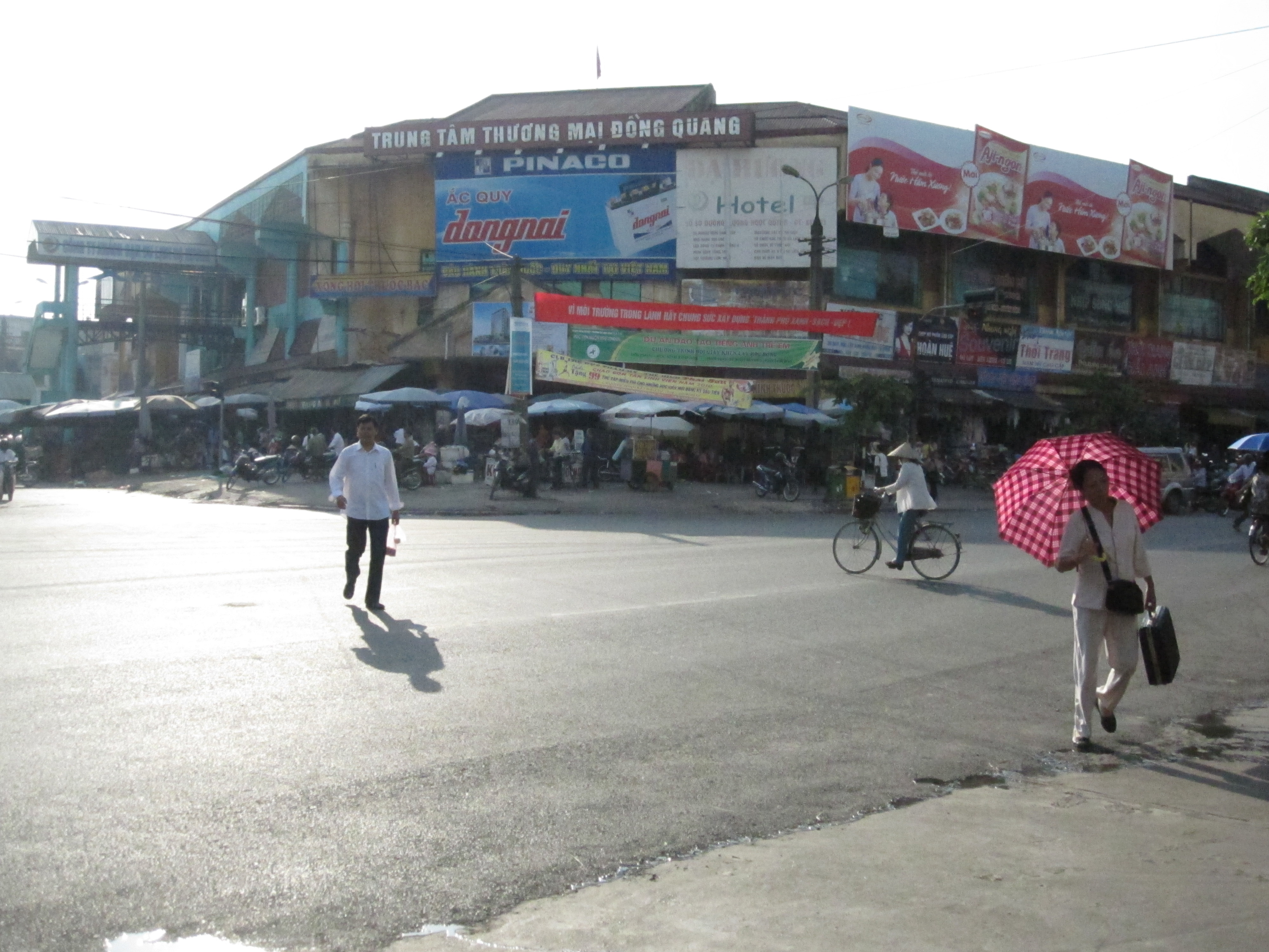 Phố Lương Ngọc Quyến, thành phố Thái Nguyên.